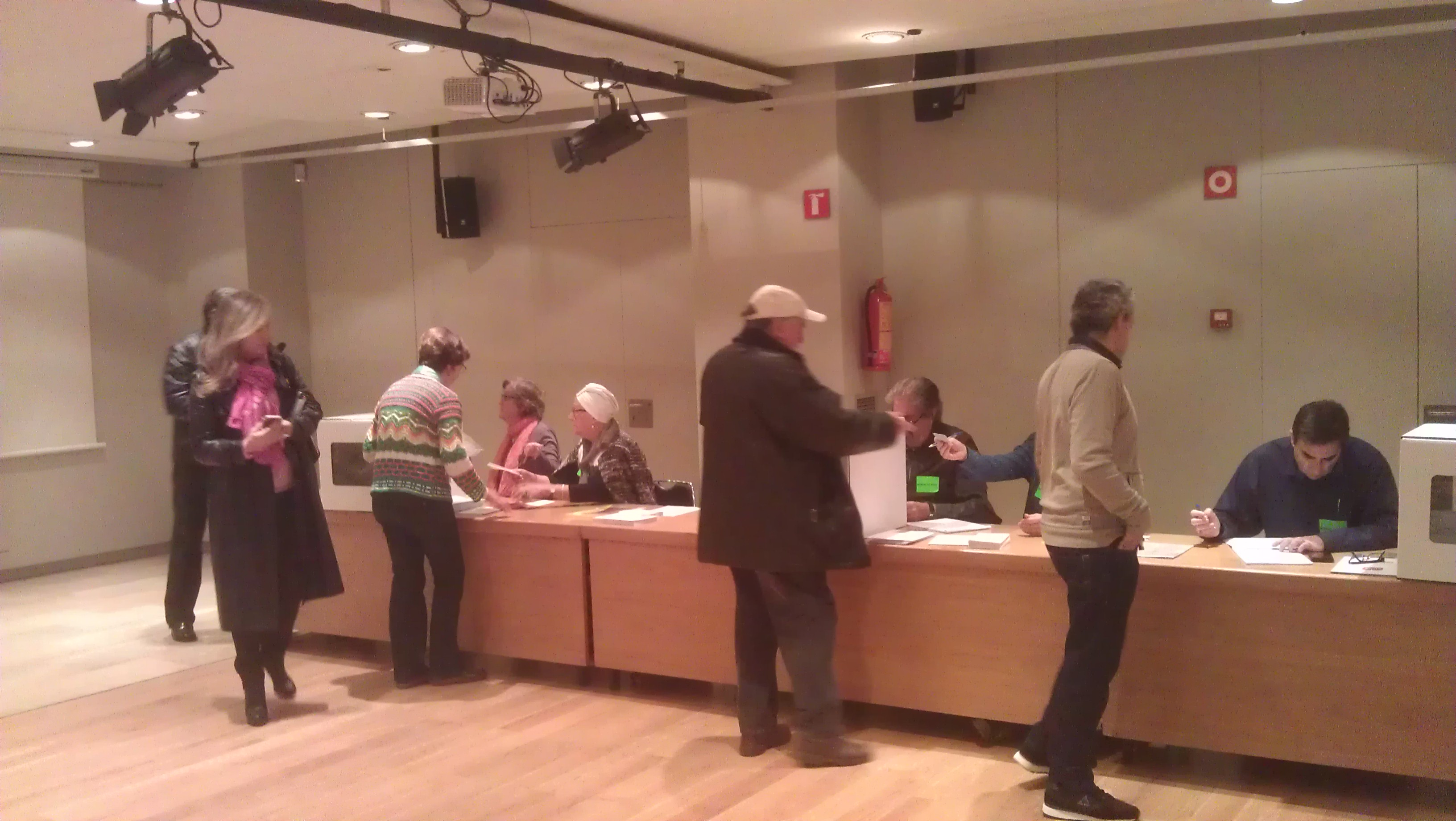 Volksbefragung über die politische Zukunft Kataloniens am 09.11.2014 gegen 9:30 Ortszeit im Wahllokal am Passeig de Gràcia No. 107 in Barcelona (Wahllokal für im Ausland lebende Katalanen)